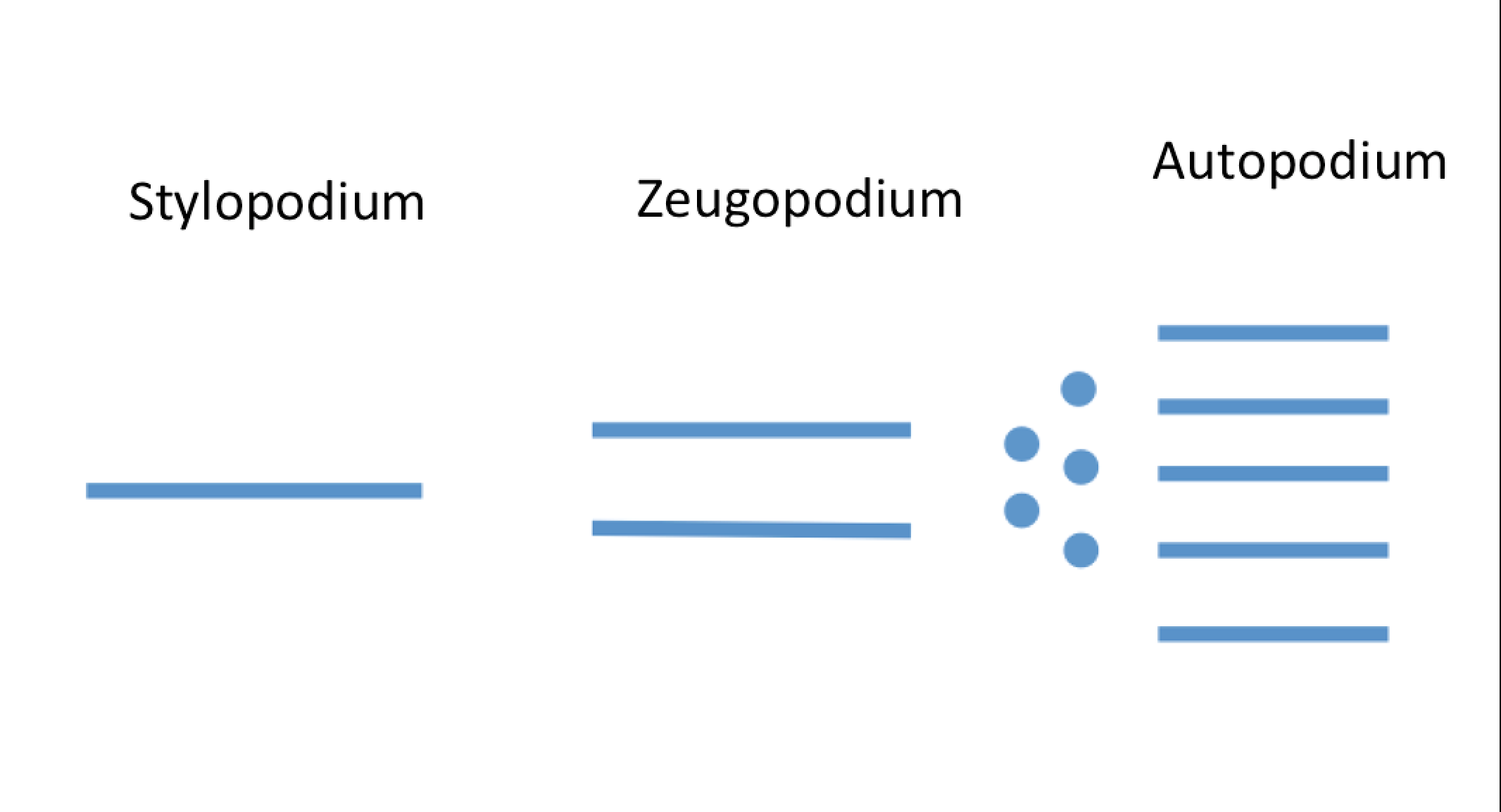 Struktur der Wirbeltierextremität